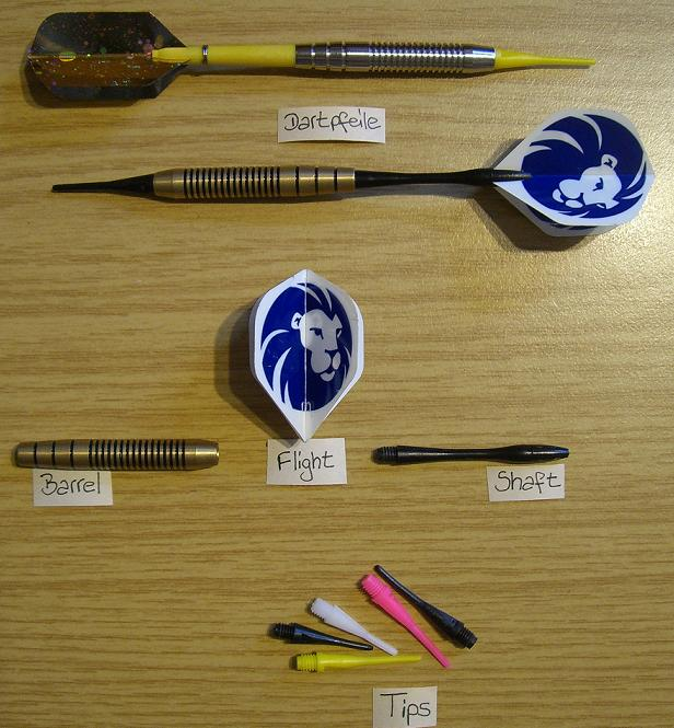 Softdarts mit Einzelteilen und Beschreibung